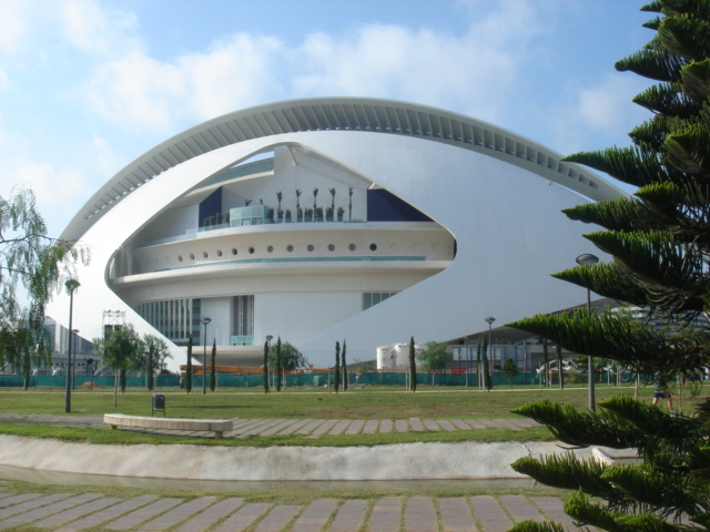 Autor:17:02, 10 October 2005 (UTC) Palau de les Arts Valencia-España